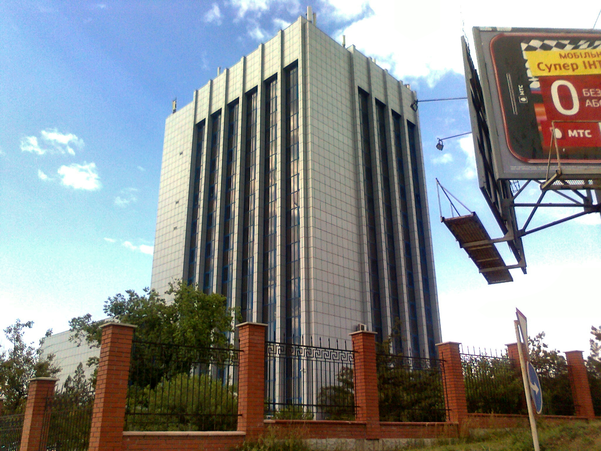 Новый корпус ТНУ